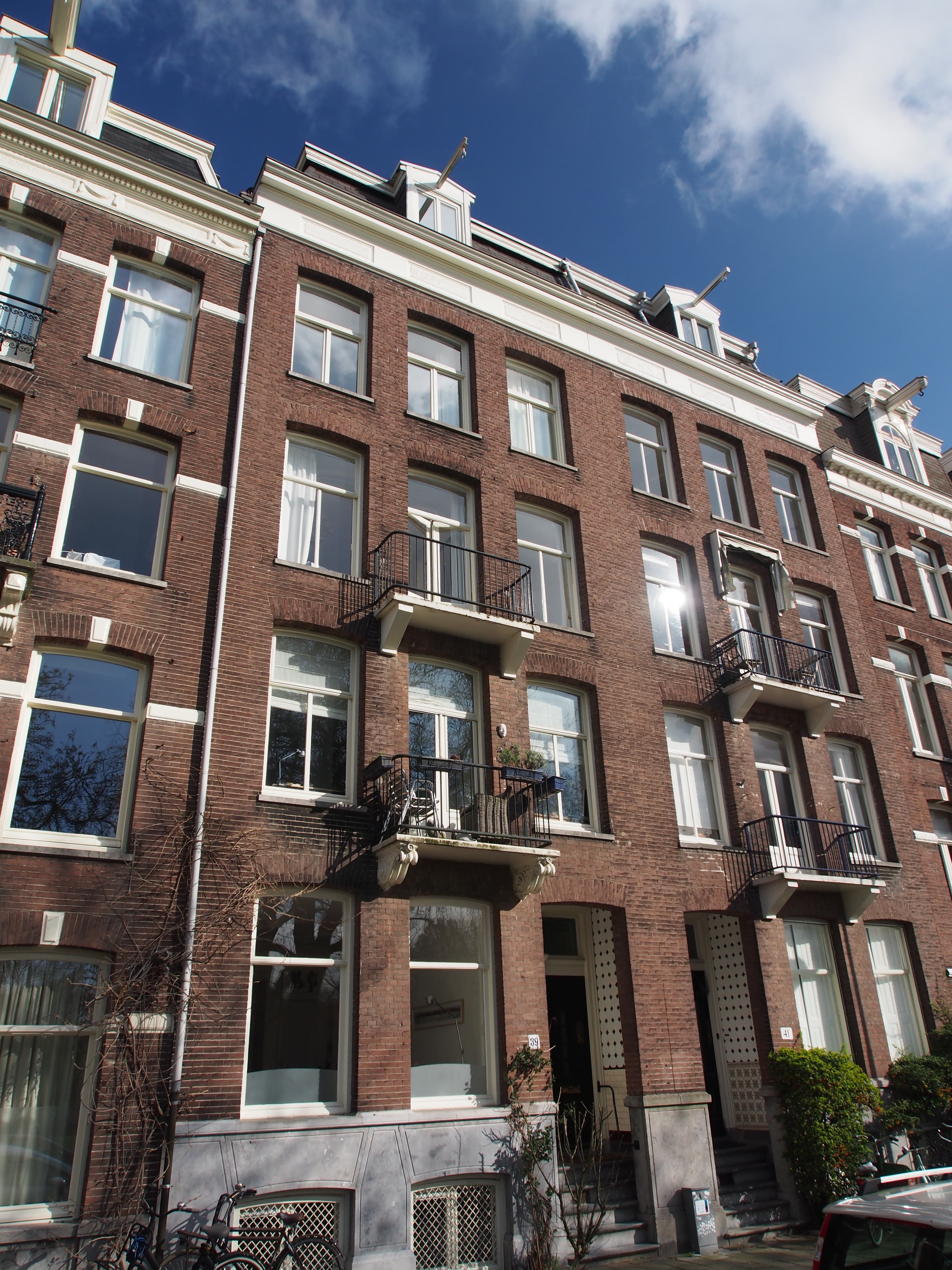 Monument in Amsterdam.